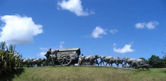 Monumento La Carreta realizado por José Belloni . Se encuentra en el Parque Batlle en Montevideo, Uruguay